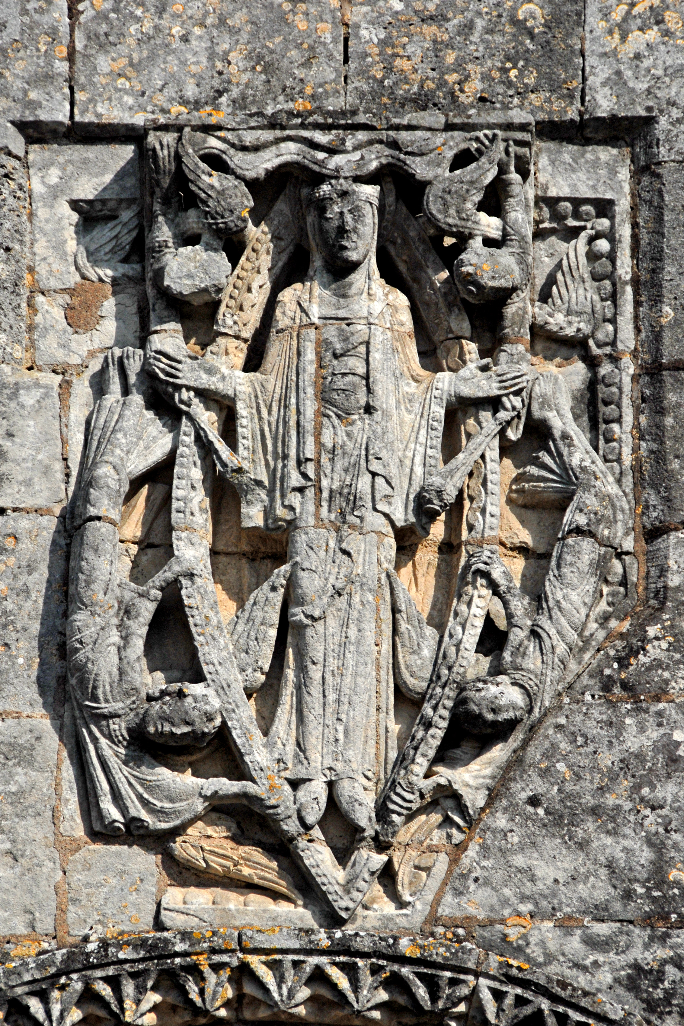 Gensac-la-Pallue, Hochrelief, Muttergottes in der Mandorla